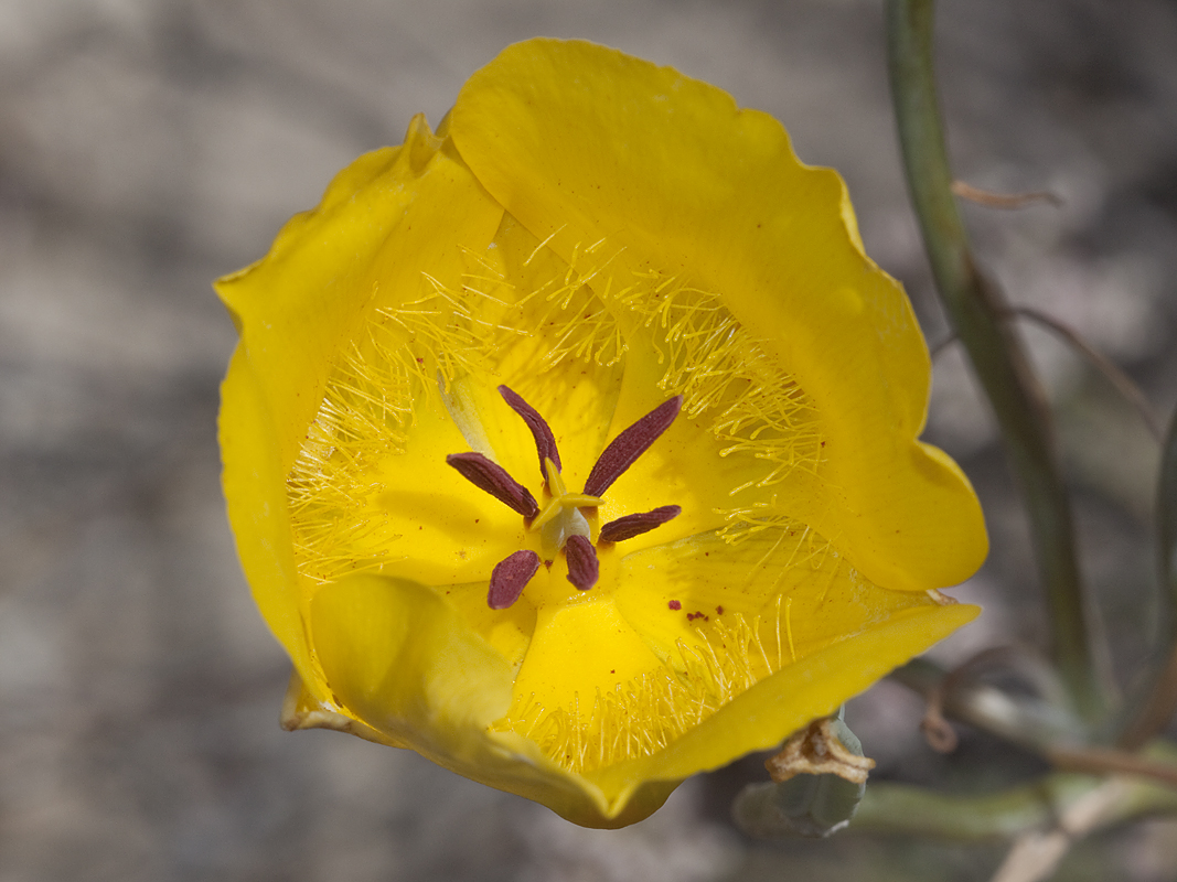 Calochortus clavatus var. pallidus. Mile 32, CA-58, San Luis Obispo Co., CA USA June 2